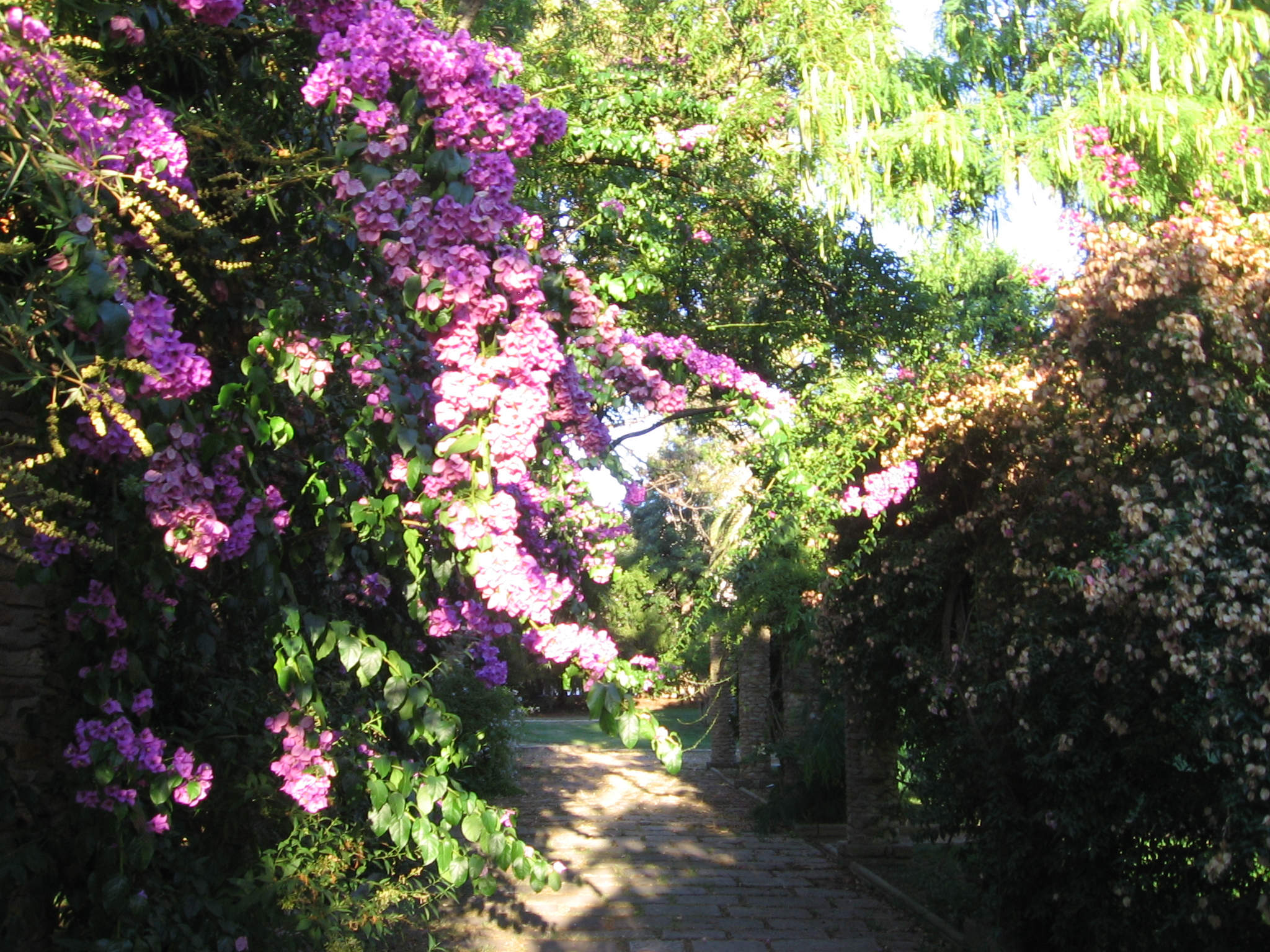 Jardín Aclimatación de Barcelona.